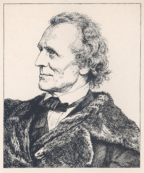 Julius Schnorr von Carolsfeld, gezeichnet von Hugo Bürkner, Holzschnitt von einem seiner Schüler.